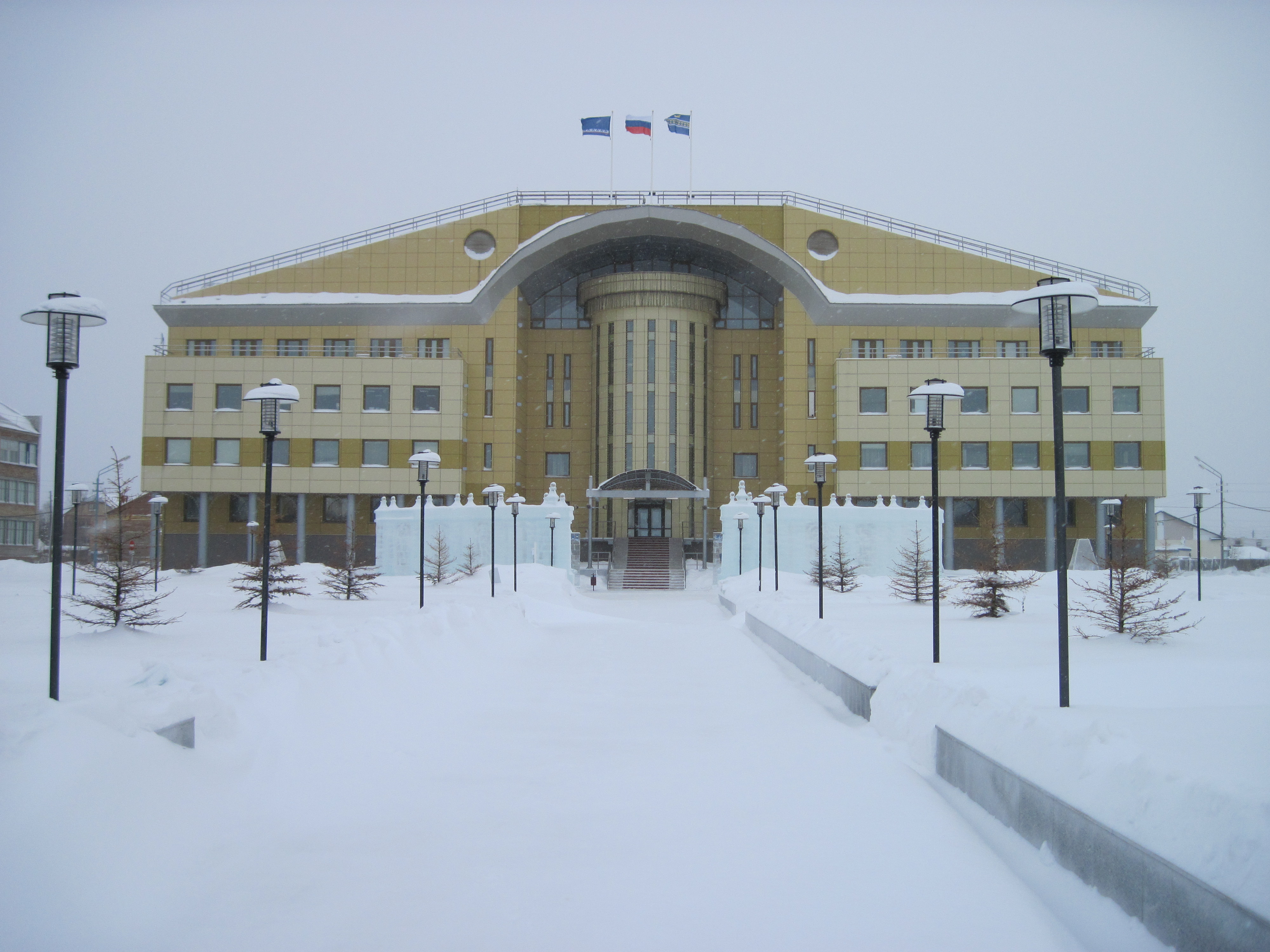 город Тарко-Сале, Пуровский район, Ямало-Ненецкий автономный округ, Россия